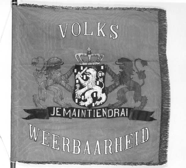 Vaandel van de Vereeniging Volksweerbaarheid (1900 - 1925 – begin 20ste eeuw) Anoniem. Ripsstof, geborduurd; hout, gedeeltelijk verguld. Schenking 1933 afkomstig van de Vereeniging Volksweerbaarheid, onderafdeling Schiet- Scherm- en Gymnastiekvereeniging Utrecht. Bij dit vaandel horen 15 prijspenningen (inv. nrs. 7022/001-015). Afmetingen hoogte 96 cm, breedte 93.8 cm; stok: lengte 278 cm Opschrift m.: VOLKS // WEERBAARHEID; Opschrift m.: JE MAINTIENDRAI; Opschrift keerzijde m.: ONDERAFDEELING S.S.G. VEREEN. // "UTRECHT"; Opschrift op bekroning vaandelstok: VOOR KONINGIN EN VADERLAND Catalogus van het Historisch Museum der stad, supplement